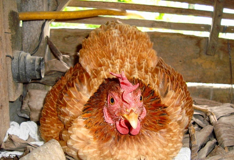 Ayam betina sedang mengerami telur-telurnya.